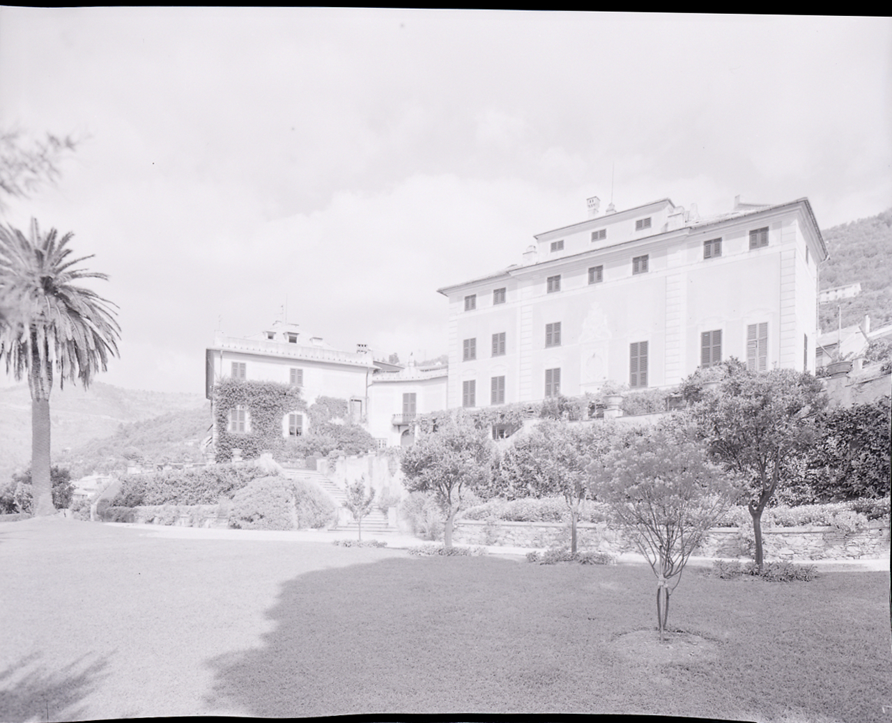 Genova, quartiere di Nervi, Villa Cattaneo della Volta Servizio fotografico : Genova, 1964 / Paolo Monti. - Buste: 5, Fototipi: 5 : Negativo b/n, gelatina bromuro d'argento/ pellicola ; 10x12. - ((Serie costituita da 5 buste sciolte di negativi identificati con i nn.: 8979, 8980, 8981, 8982A, 8982B. - Il negativo identificato con il numero 46397 è stato realizzato per Zodiac. - Occasione: Documentazione per la pubblicazione: Italia Nostra (a cura di), "Le ville genovesi", catalogo della mostra, Genova 1962, Genova, Comune di Genova, 1967. - Fonte: Monografia di Italia Nostra (a cura di): Le ville genovesi, catalogo della mostra, Genova 1962, Genova, Comune di Genova (1967). - Fonte: Lettera di Paolo Monti: I. Carteggi/ Genova - Enrico (1963-1966), presso Archivio Paolo Monti. Camicia con documenti dattiloscritti e manoscritti vari relativi al lavoro eseguito per Italia Nostra: preventivi, lettere, inventari. - Fonte: Agenda di Paolo Monti: Monti/ 2/ 6 giugno 1964 - 31 marzo 1966/ 8194-12420 (1964-1966), presso Archivio Paolo Monti